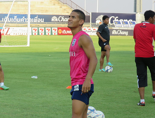 Renan Silva